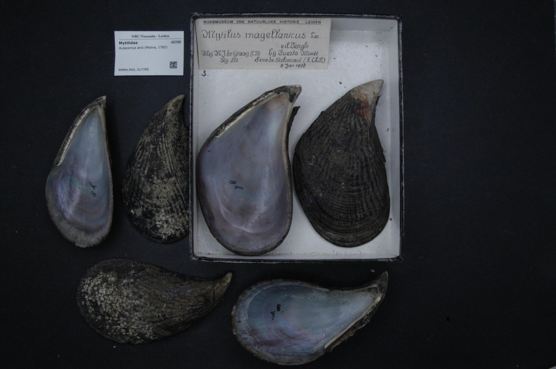 Aulacomya atra (Molina, 1782)